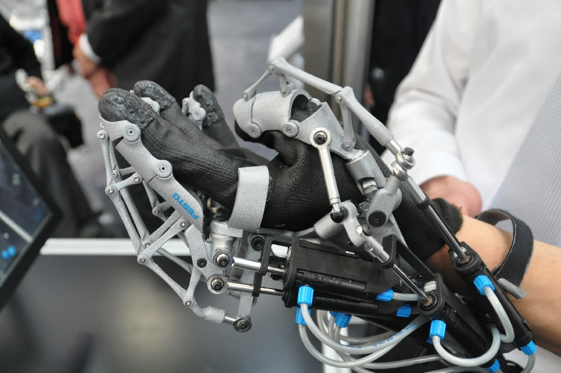 Hannover-Messe April 2012 Dieses Foto entstand durch die Mithilfe des gemeinnützigen Vereins Skillshare bei der Akkreditierung als Fotograf. Infos unter skillshare.eu Skillshare e.V. ist ein eingetragener gemeinnütziger Verein zur Förderung der Bildung durch Unterstützung der Erstellung, Sammlung und Verbreitung so genannten freien Wissens. IBAN: DE16 8306 5408 0004 8850 66 BIC: GENODEF1SLR Bank: VR-Bank Altenburger Land